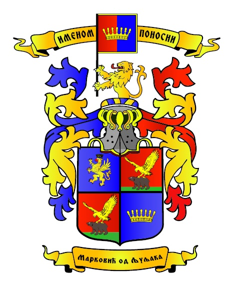 грб фамилије Марковић из гружанског села Љуљаци